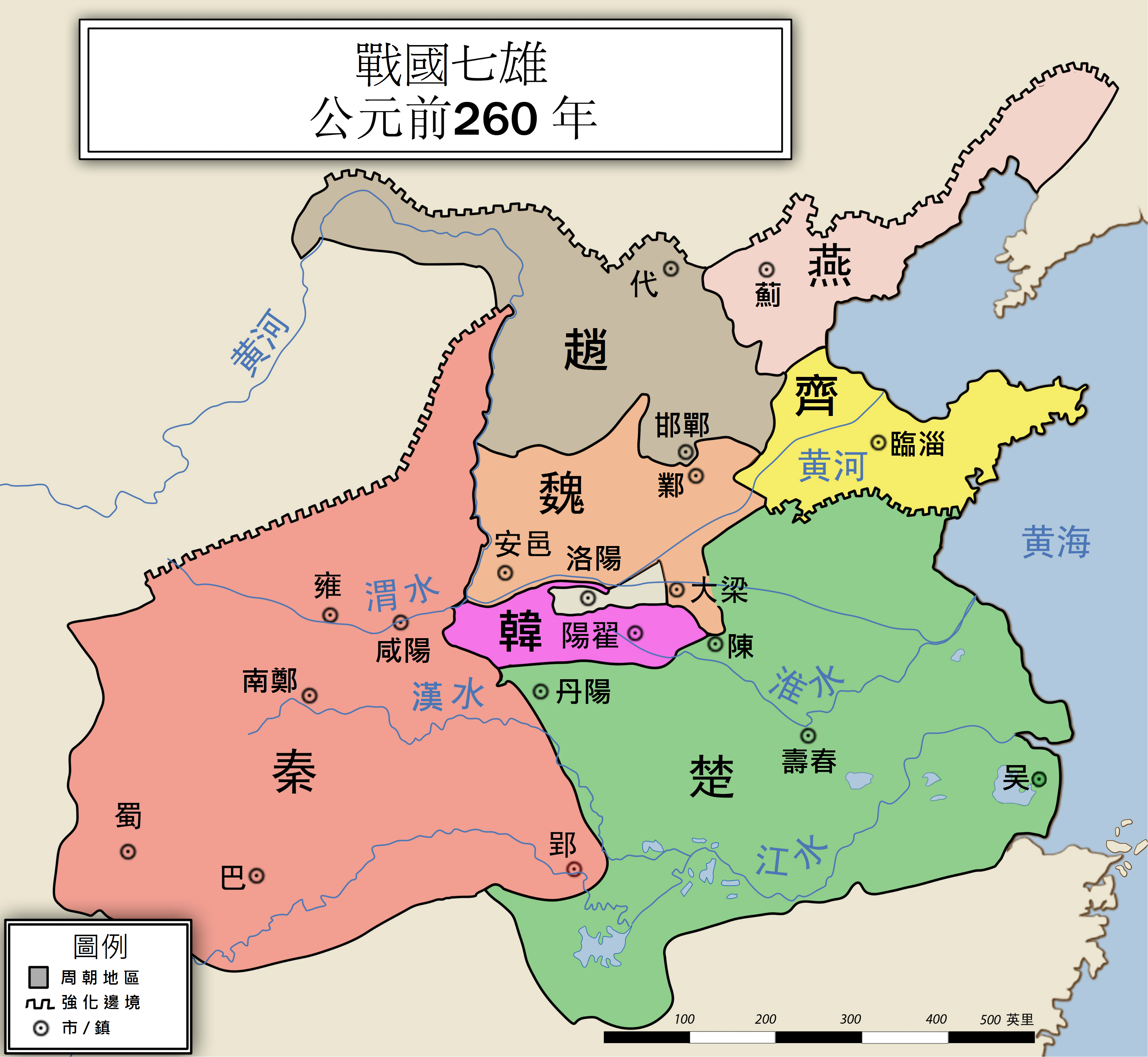 中文（台灣）: 正體中文版本的戰國七雄地圖